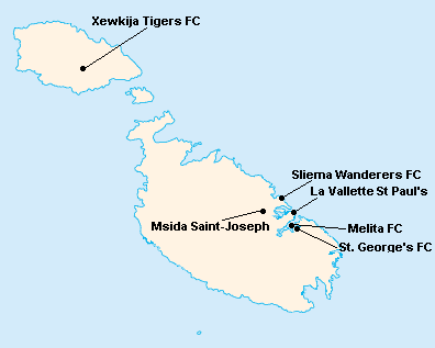 Répartition des clubs en First Division Maltaise 1939-1940.